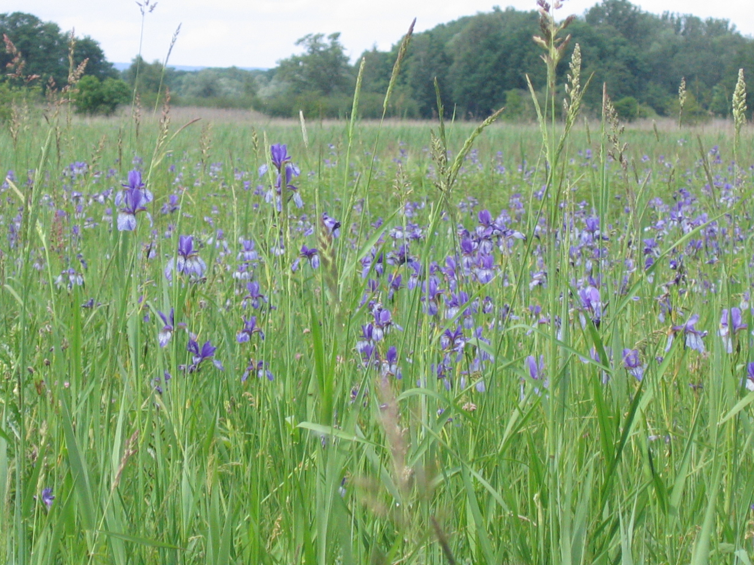 Deutschland - Baden-Württemberg - Bodenseekreis - Eriskirch: Irisblüte im Eriskircher Ried